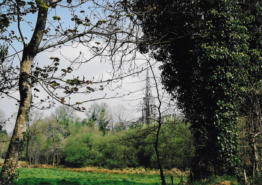 Gweledva